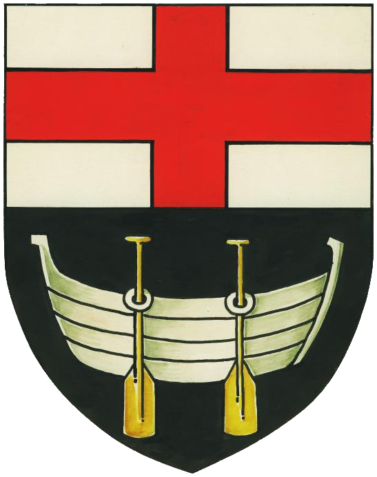 Das Georgskreuz weist auf die jahrhundertelange Zugehörigkeit der Gemeinde zum Besitz der Kurfürsten aus Trier hin. Diese endete erst mit der Säkularisierung am Anfang des 19. Jahrhunderts. Der Nachen mit den zwei Rudern steht im Bezug auf die Namensgebung unserer Gemeinde. Die frühesten, überlieferten Namensformen lauten Urvare, Oruar oder Urvar. Sie alle gehen auf ein mittelhochdeutsches Wort zurück, nämlich „Urvar“. Das Wort bezeichnet eine Stelle am Ufer, an der angelegt oder übergefahren werden kann. Hier konnte man also „überfahren“, was auch in der Übersetzung des lateinischen Wortes „overvare“ liegt. Ein Fährbetrieb vom Neuendorfer Ufer ist nachgewiesen und die alten Urbarer sagen heute noch liebevoll ORWER zu ihrem Ort.